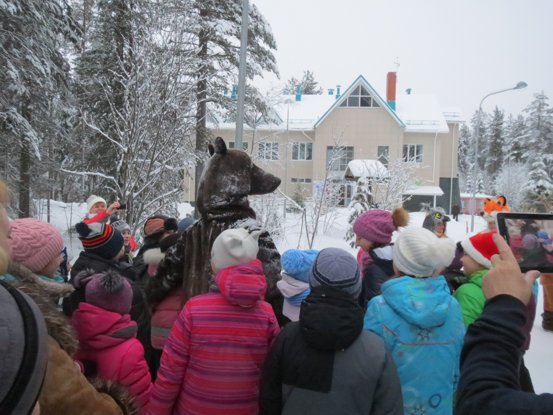 Rakennus ja juhlintaa ulkona joulukuussa 2015